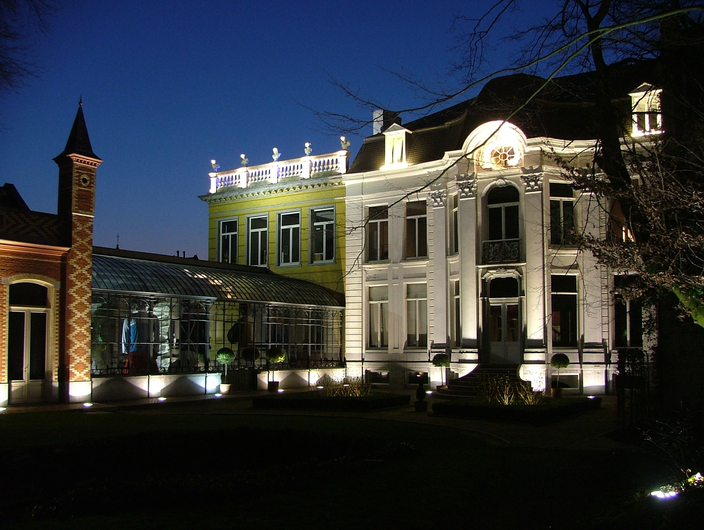 Photo nocturne de la Maison des Géants d'Ath